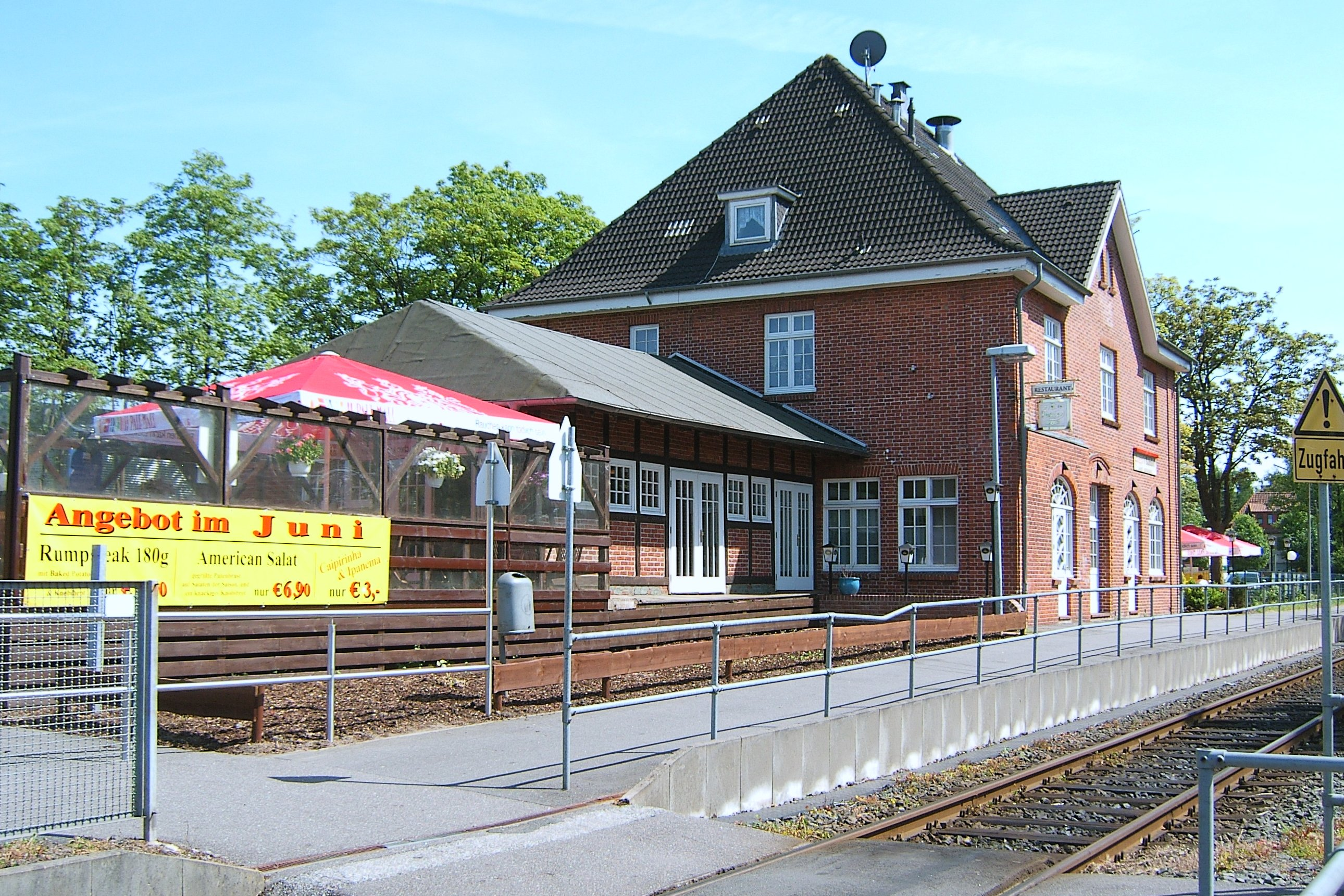 Bildbeschreibung: Hamburg, Schnelsen, alter Bahnhof This is a photograph of an architectural monument. Fotograf: selbst Datum: 9.6.2006